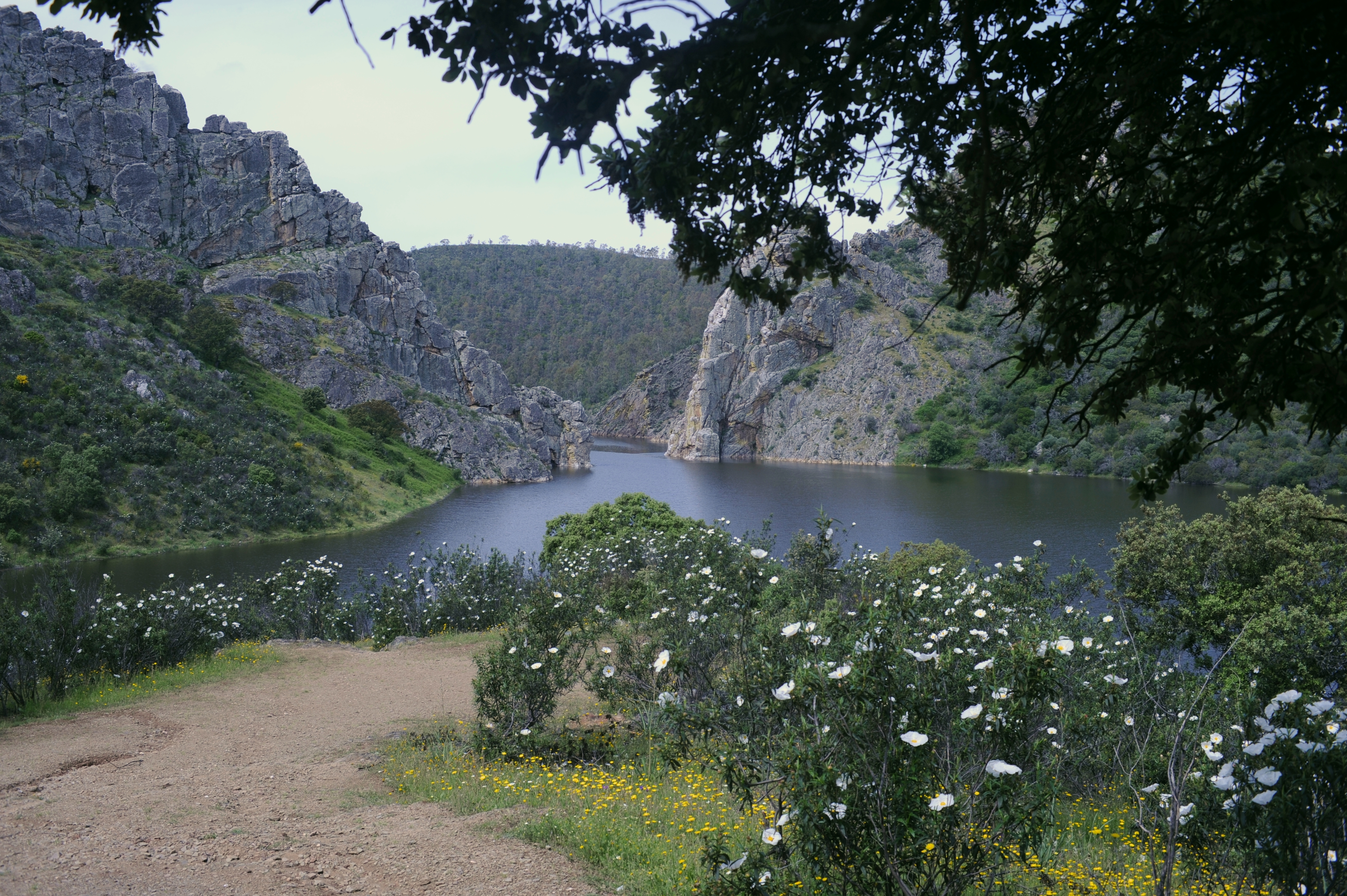 Zona Especial de Protección de Aves de los Canchos de Ramiro, oeste de la provincia de Cáceres